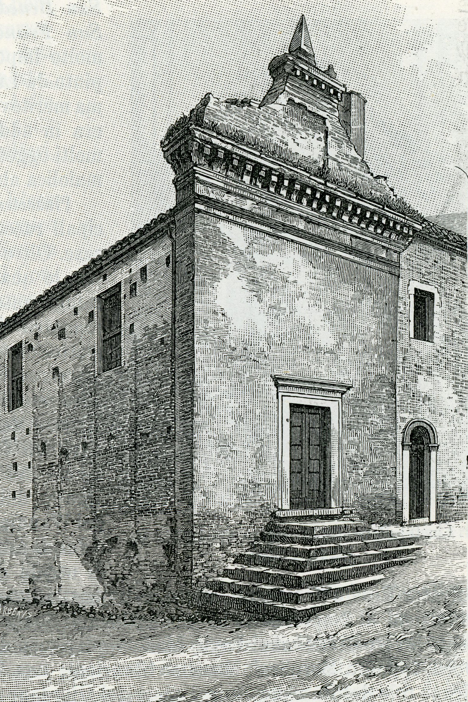 Chieti: chiesa di San Paolo, antico tempio di Castore e Polluce (xilografia di Barberis 1898).